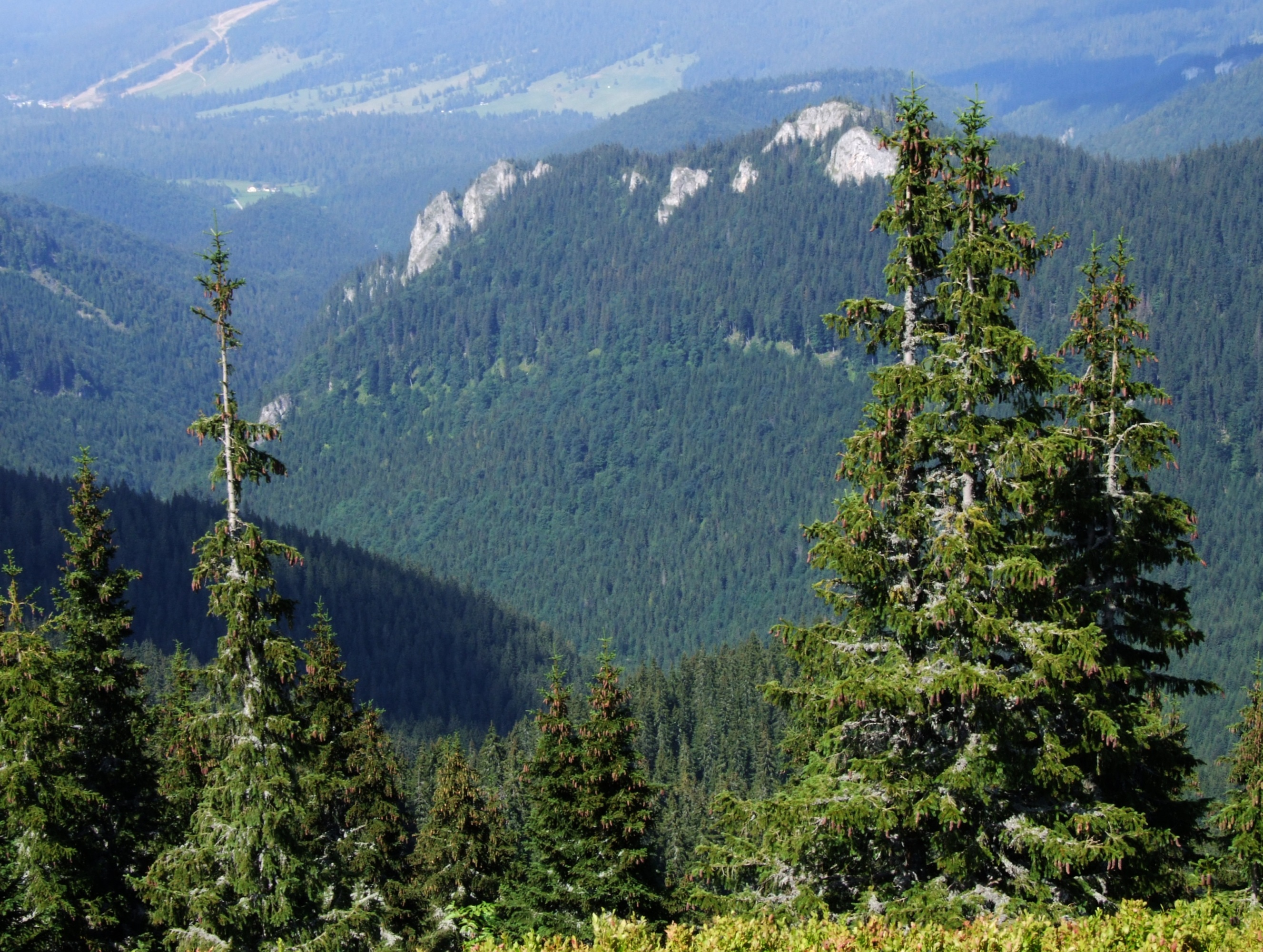 Jamborowa Skałka nad Doliną Bobrowiecka Orawską. Z tyłu za nią Jeżowy Wierch